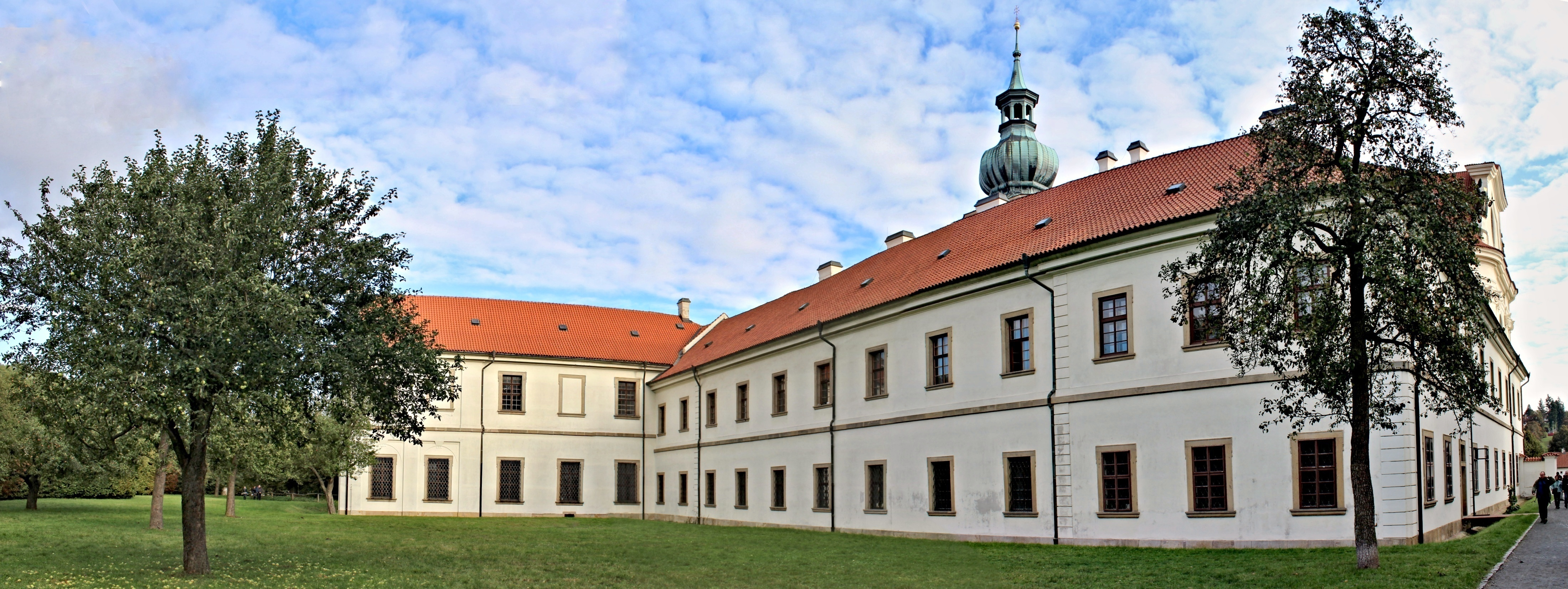 Břevnov klášter